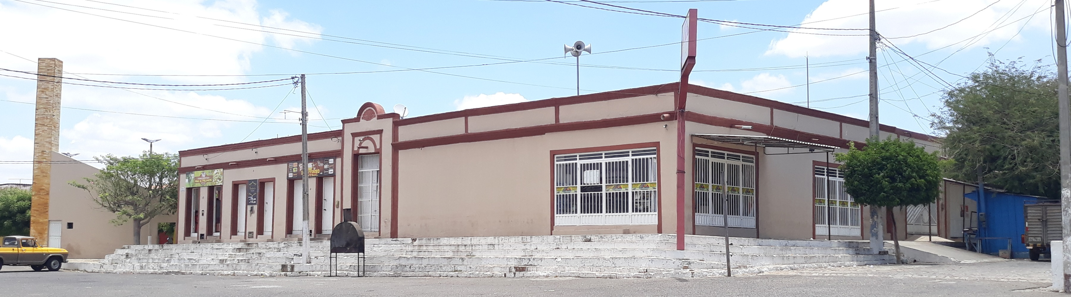 Mercado Municipal de Luís Gomes, no Rio Grande do Norte (Brasil)